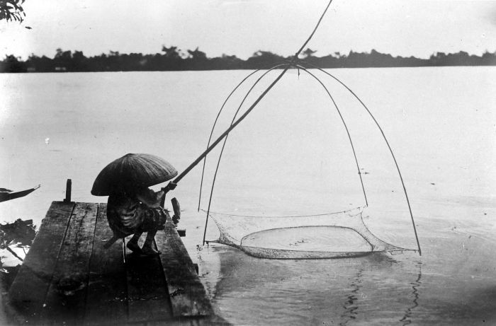 Repronegatief. Garnalenvisser in de Moesie rivier bij Palembang met een kruisnet